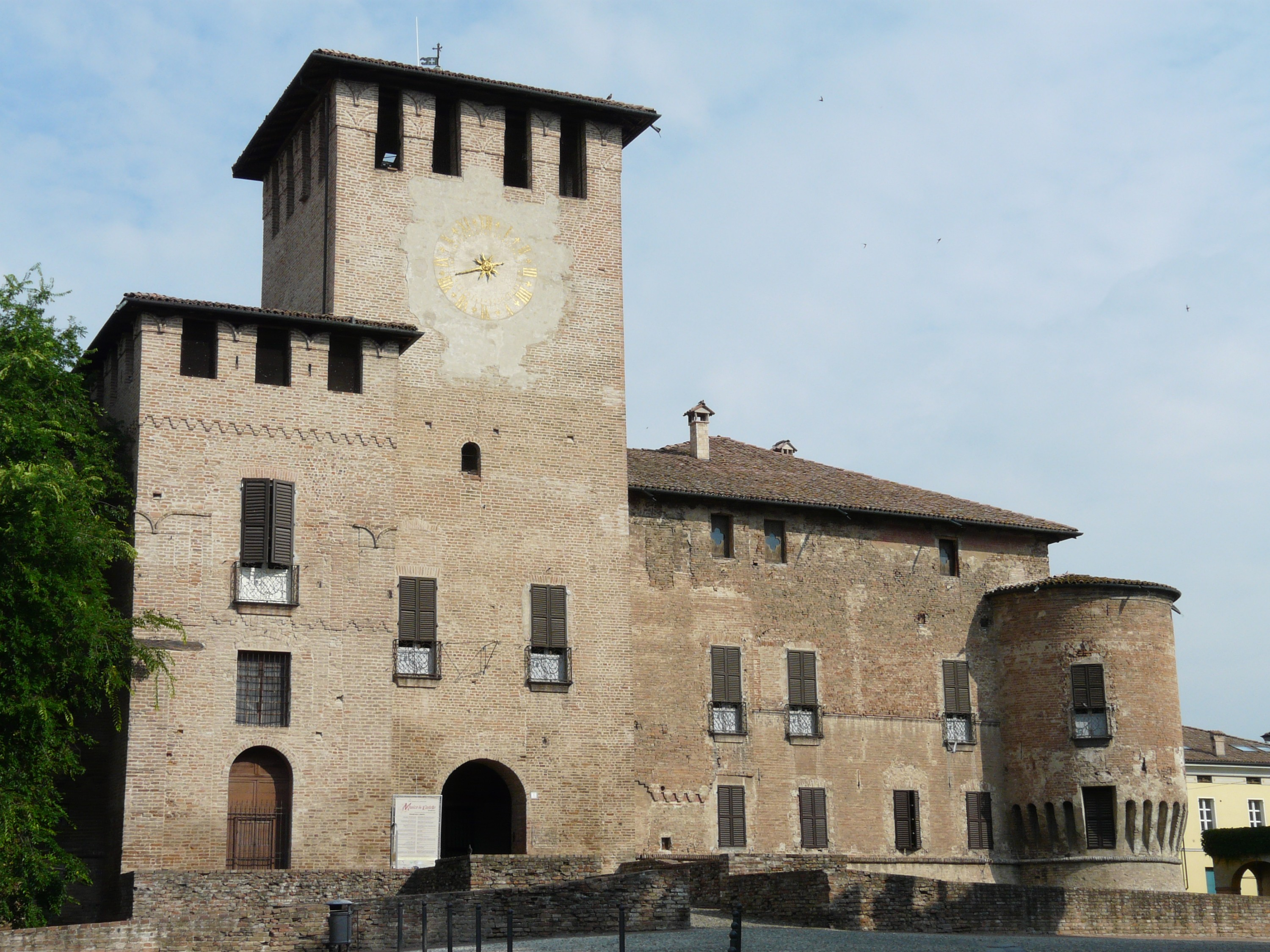 Immagini della Rocca Sanvitale di Fontanellato, Emilia-Romagna, Italia